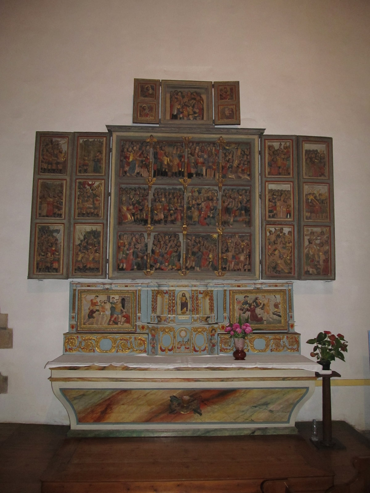 Crozon : église paroissiale Saint-Pierre, retable des dix mille martyrs, en bois polychrome, datant du XVIème siècle, triptyque avec douze panneaux au centre et deux volets latéraux de six panneaux chacun. Classé "Mobilier historique" depuis le 11 octobre 1906.